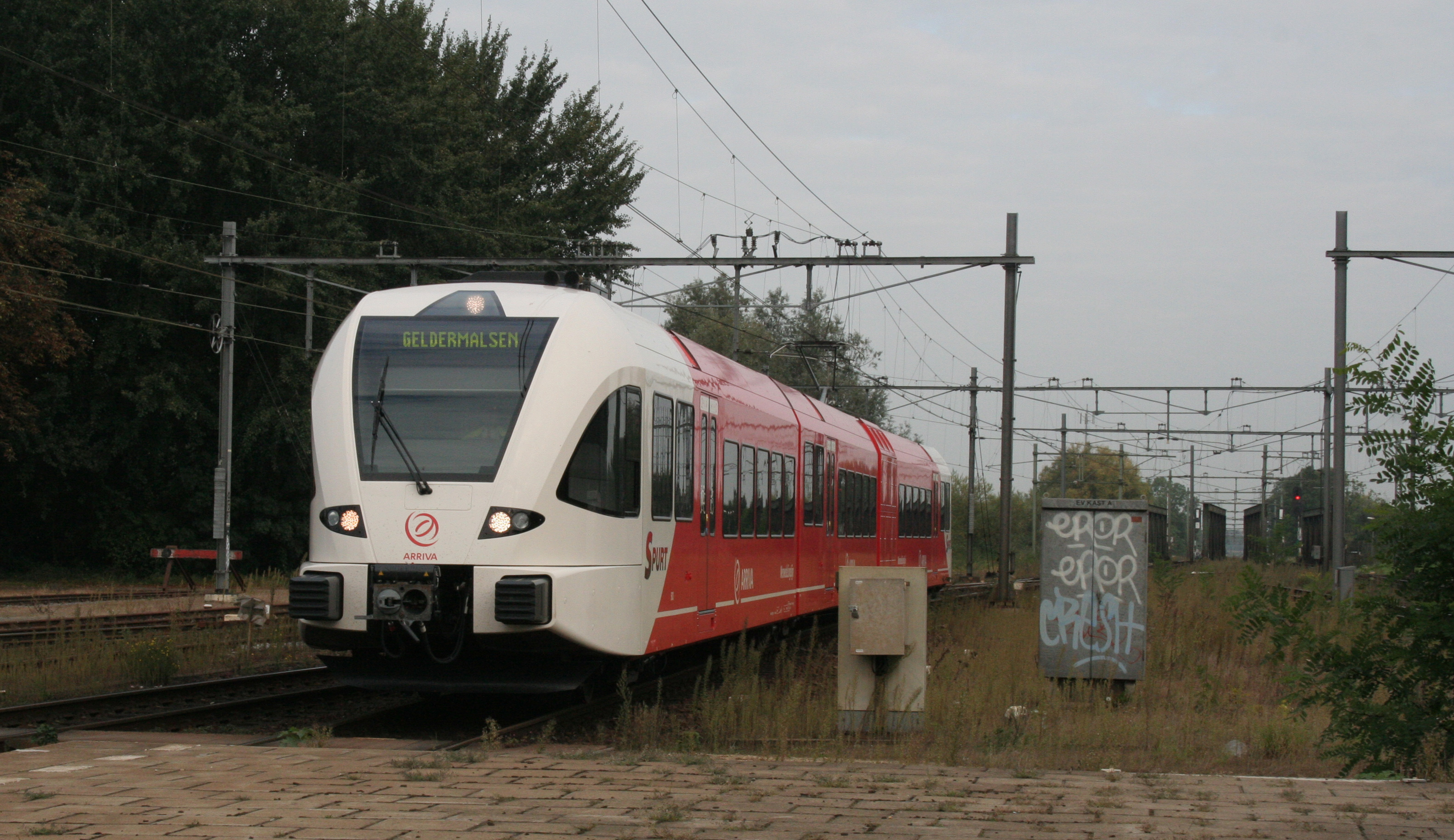 Electrische Spurt te Geldermalsen